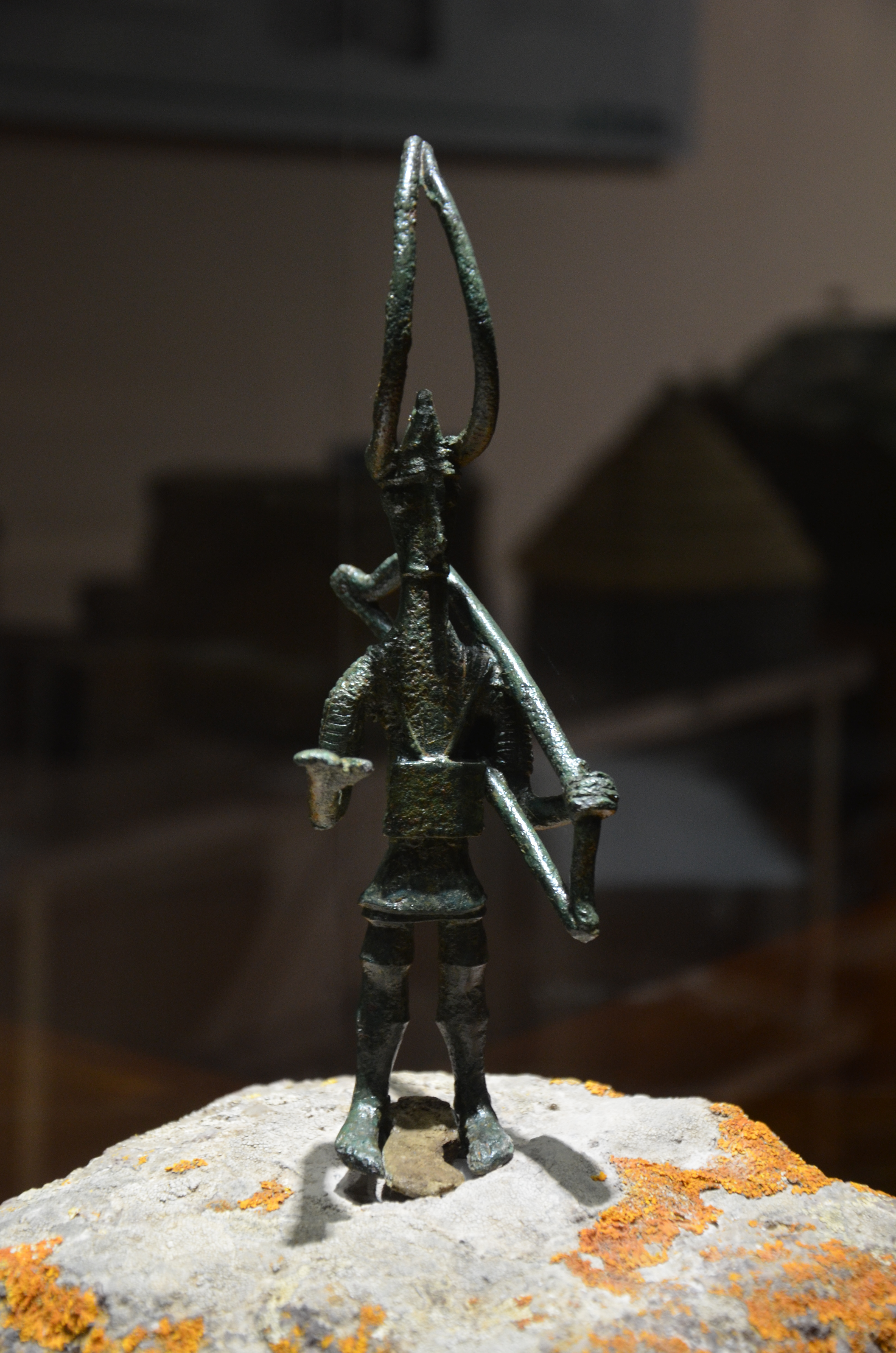 Sant'Antioco Archaeological Museum, Sardinia